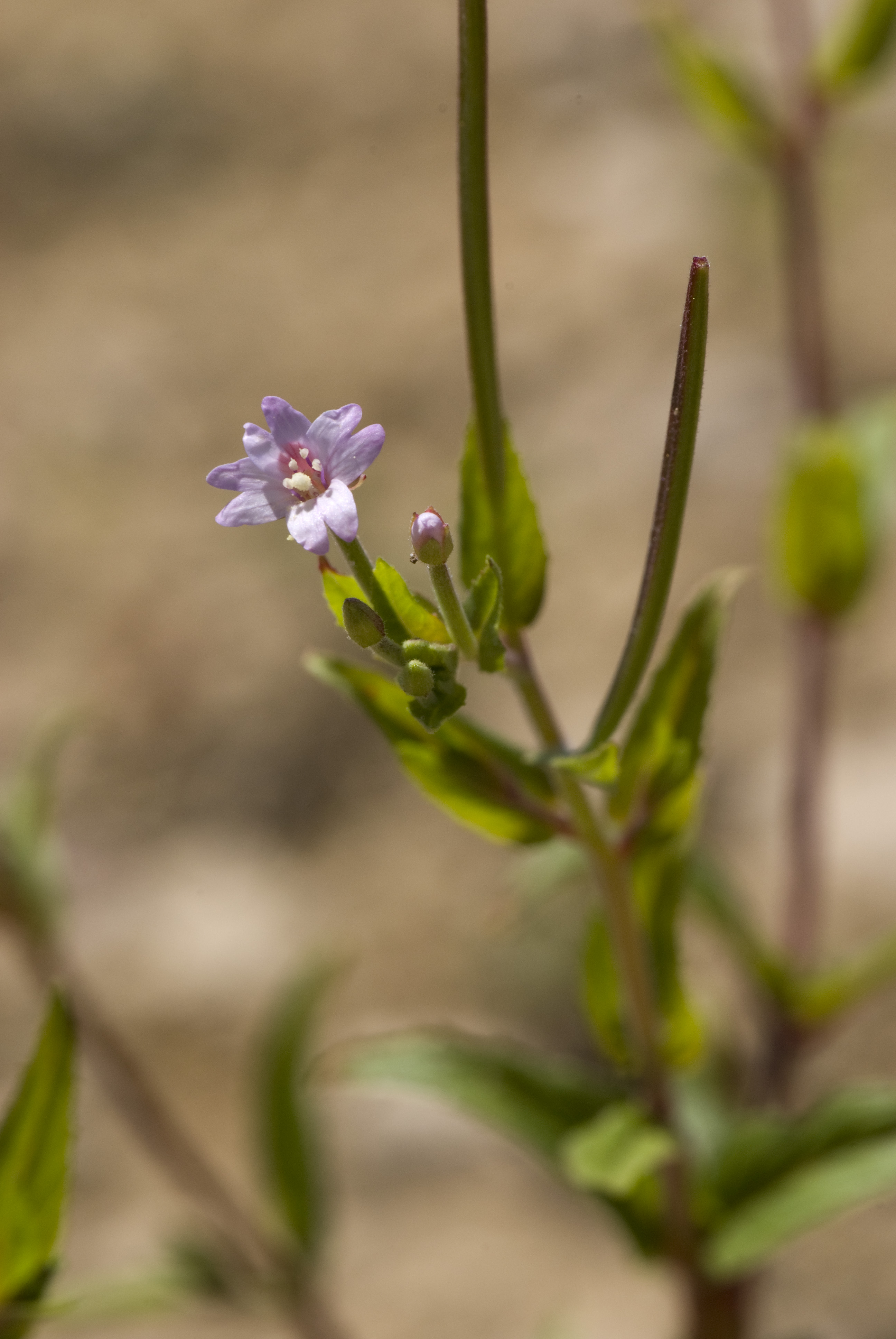 Epilobium tetragonum-ssp-lamyi Carrière de Fossoy (Aisne), France